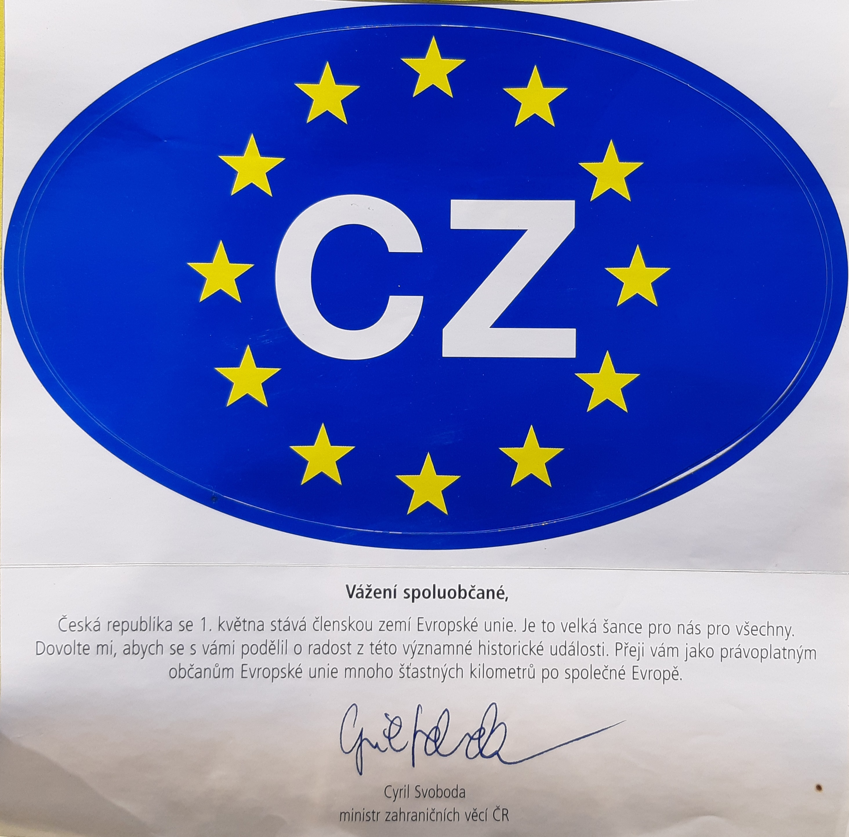 Kousek historie, nalezeno při hledání papíru na podpal. Dobový ministr zahraničních věcí Cyril Svoboda vítá občany ČR v Evropské unii.